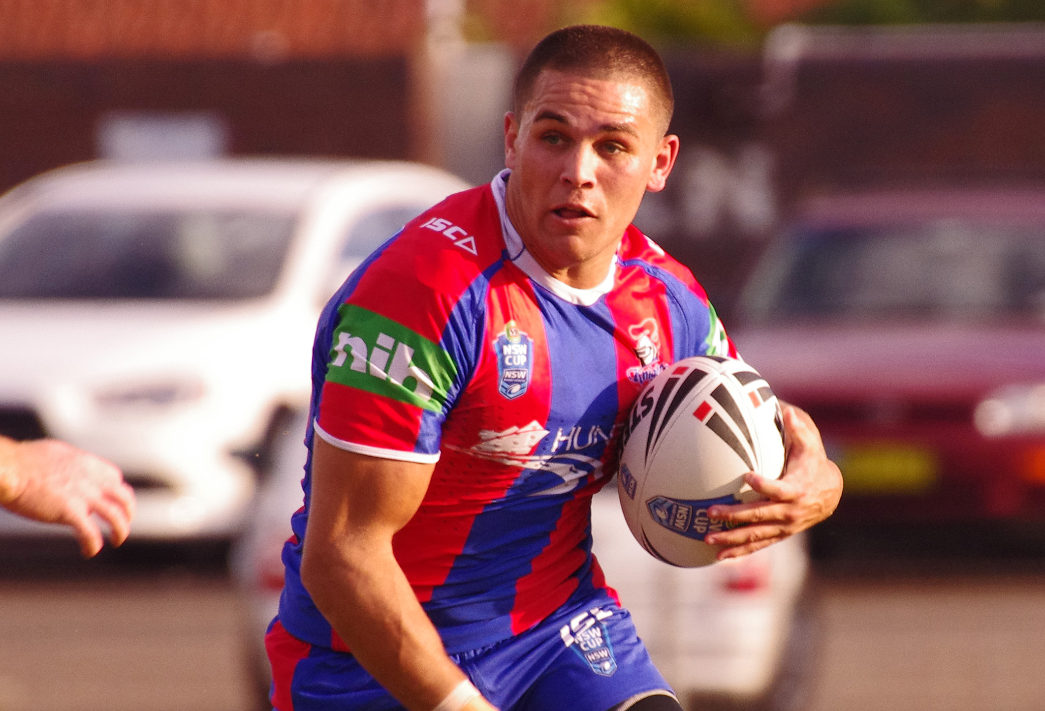 WILL SMITH